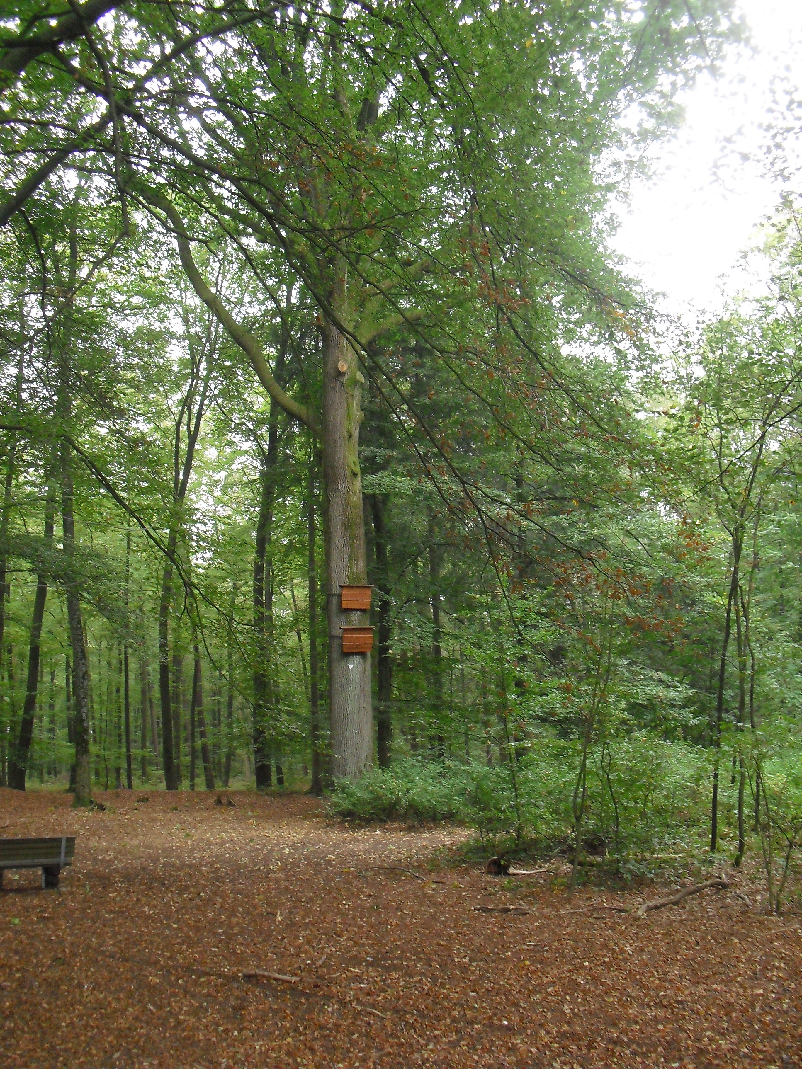 Friedenseiche in Hövelhof. Naturdenkmal des Kreises Paderborn Nr. 01 2.3.10. Der Förster Joseph Hölscher pflanzte den Baum nach seiner glücklichen Heimkehr aus dem Deutsch-Französischen Krieg 1870/71. 100 Jahre später wurden hier die Partnerschaftsurkunden mit der französischen Partnerstadt Verrieres unterzeichnet.